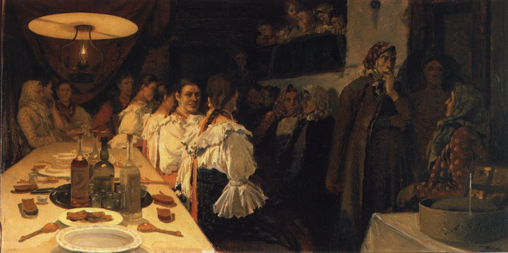 Ожидание новобрачных от венца в Новгородской губернии. 1890-1891 Этюд для картины "Ожидание новобрачных от венца в Новгородской губернии" (два варианта - 1891, ГРМ)